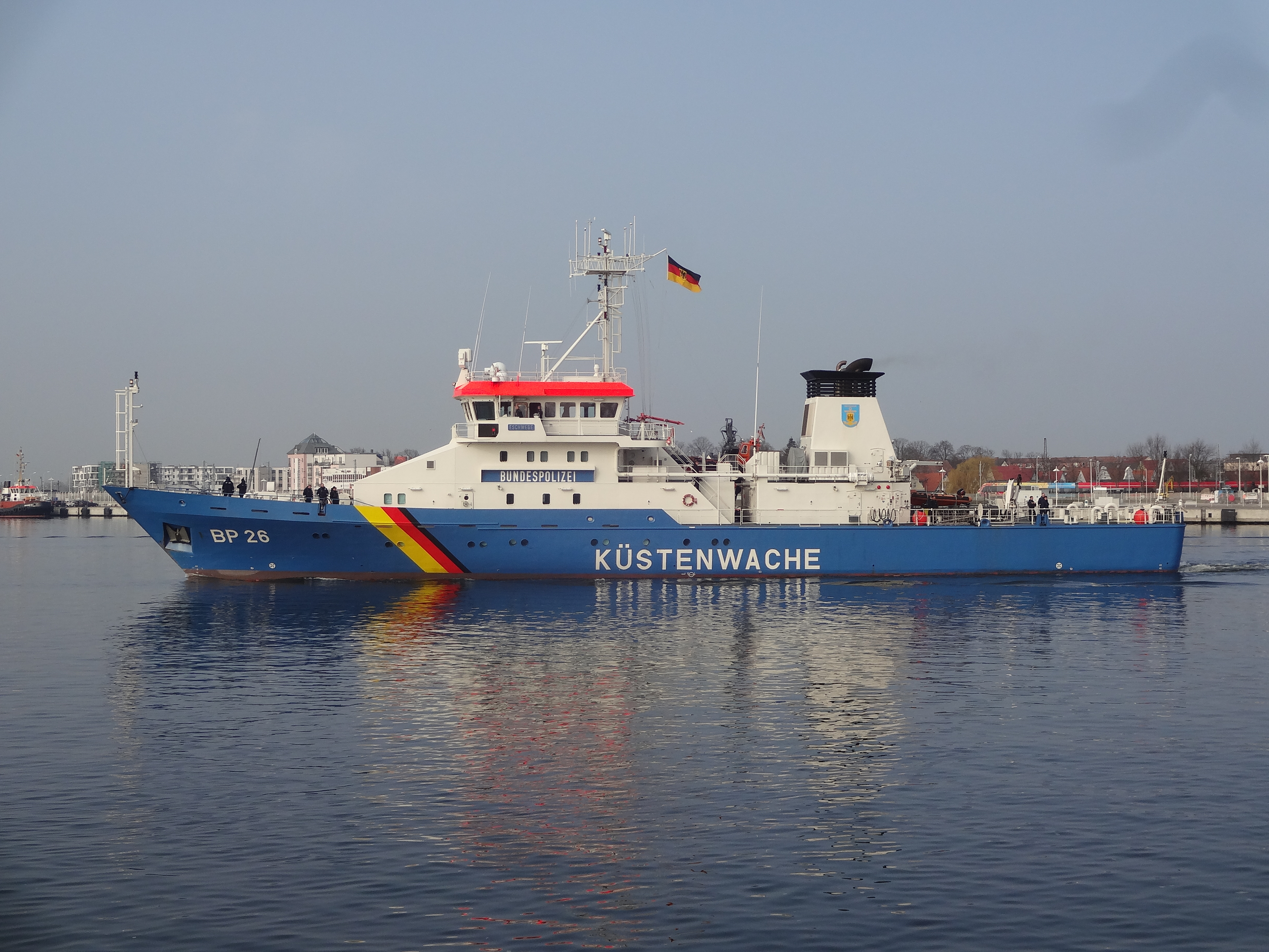 Küstenwachboot der Bundespolizei, BP26 Eschwege